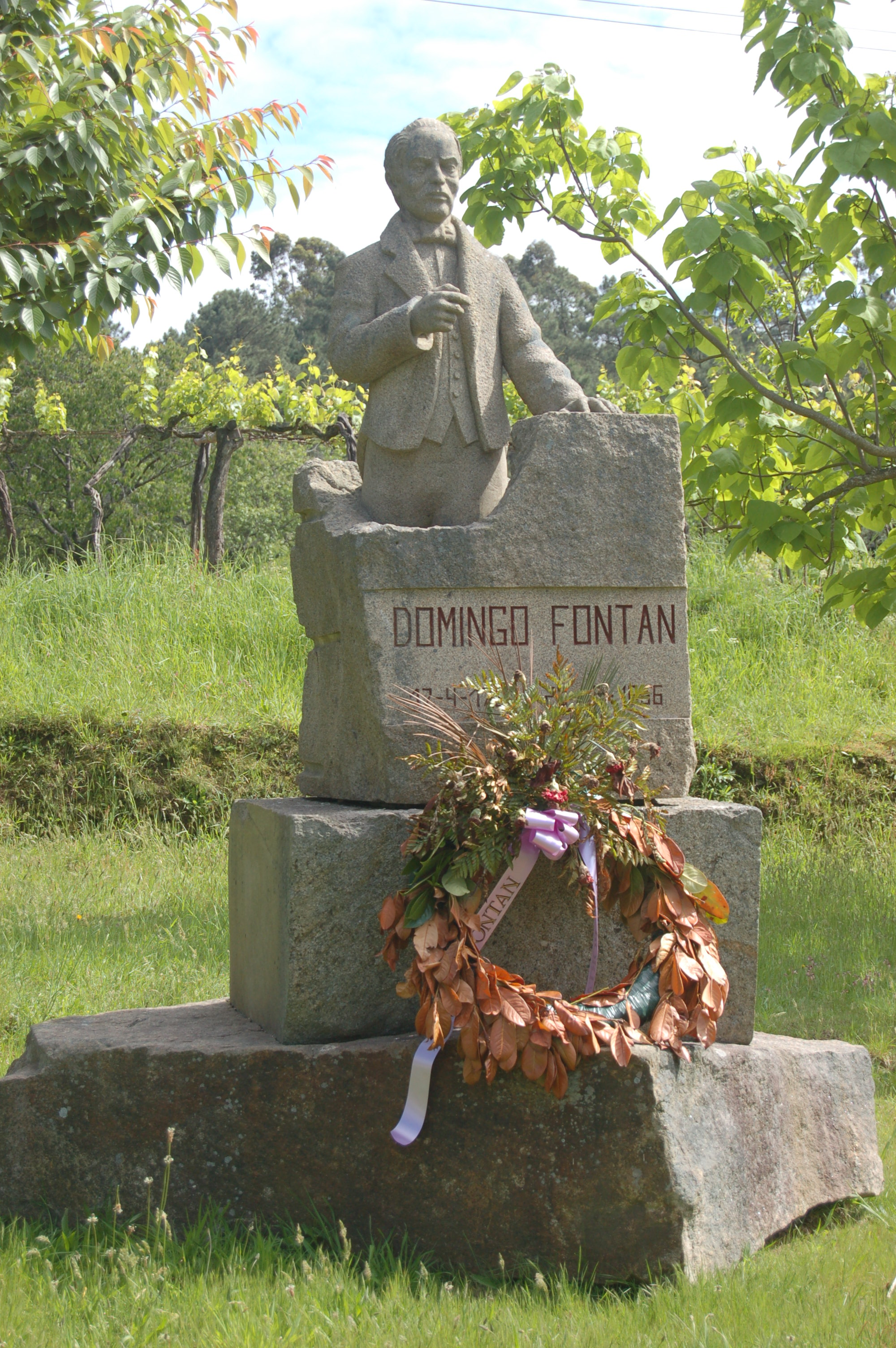 Estatua de Domingo Fontán en Porta do Conde (Portas), feita polo canteiro de Caldas de Reis Xavier Touceda